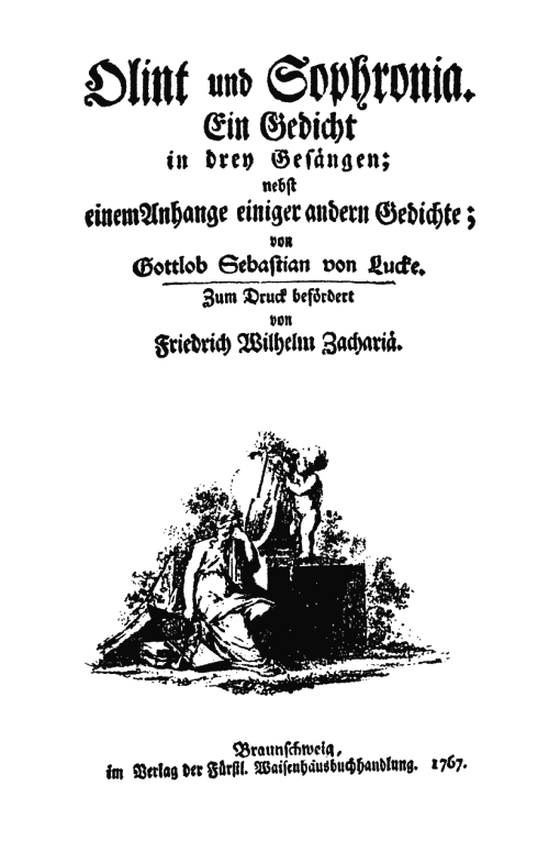 Front page of "Olint und Sophronia. Ein Gedicht in drey Gesängen" by Gottlob Sebastian von Lucke, Braunschweig 1767.